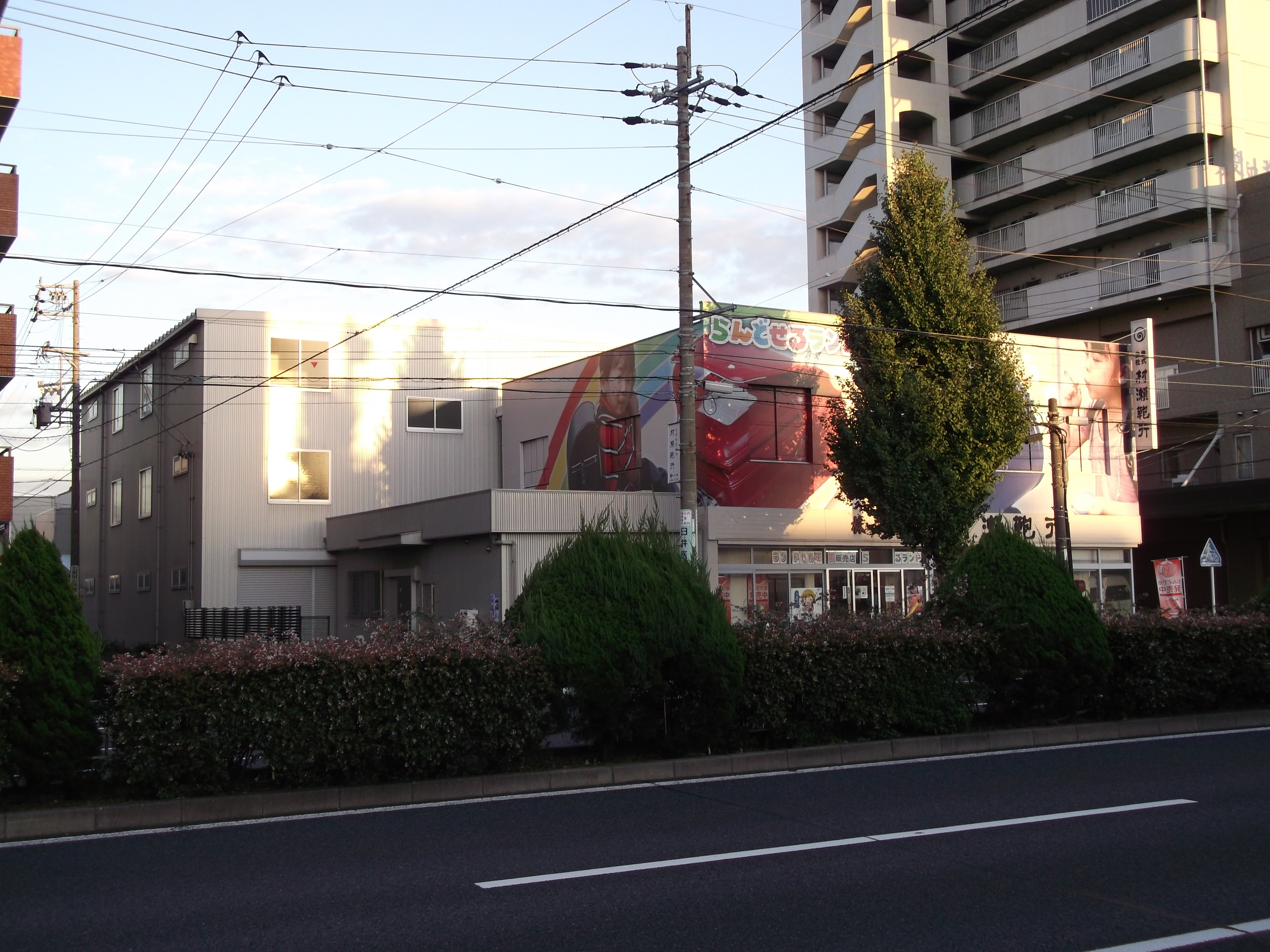 名古屋市中村区の村瀬鞄行本社を西側公道北側より撮影